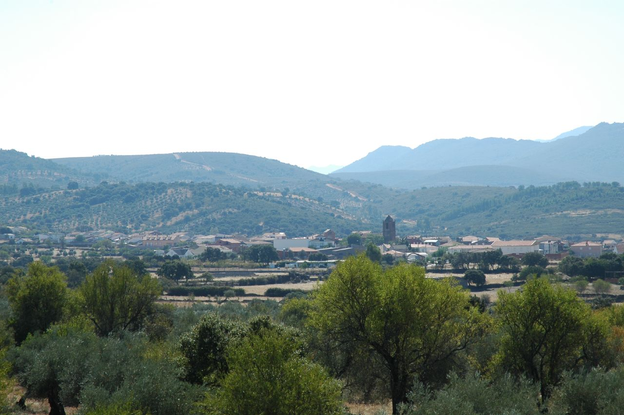 Fresnedoso de Ibor